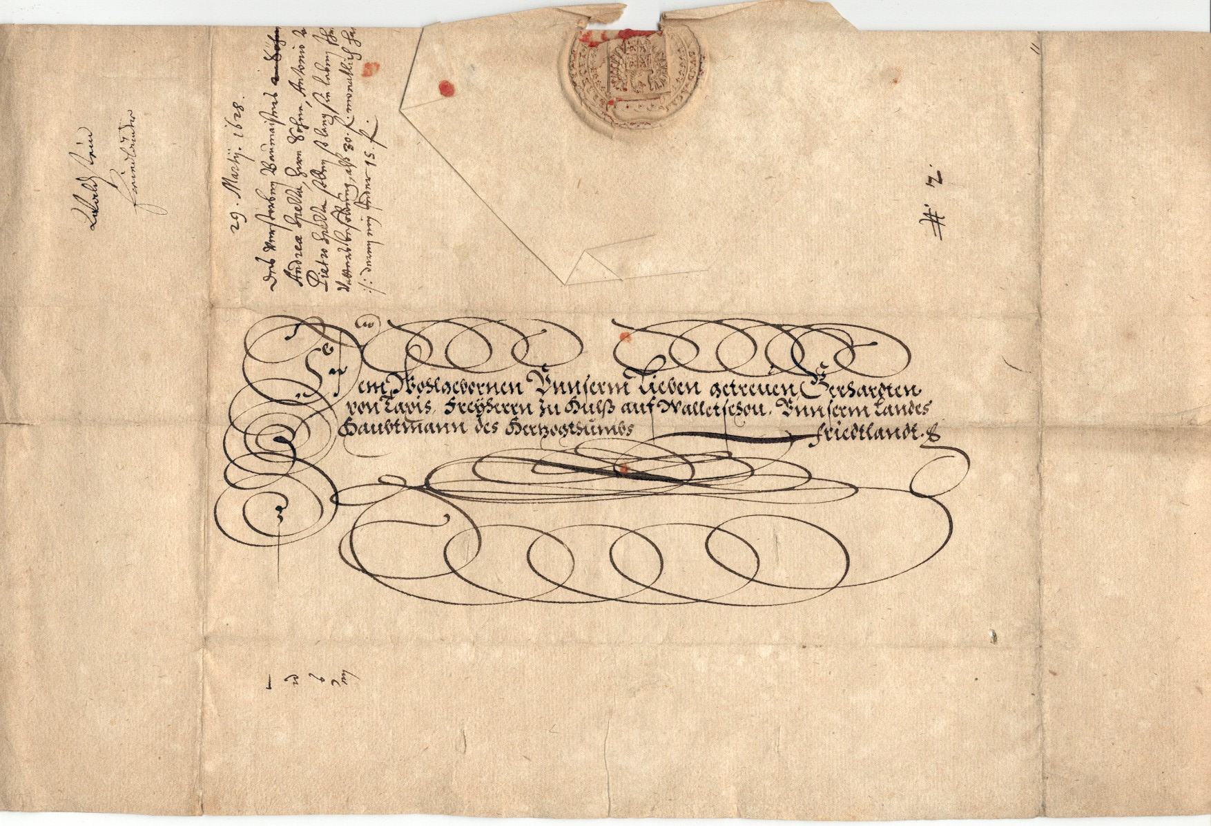 Brief des Generalissimus Wallenstein an seinen Kanzler bezüglich der Fortzahlung der Bezüge seines gestorbenen Baumeisters an dessen Söhne Aussenseite des Briefs mit Siegel Wallensteins